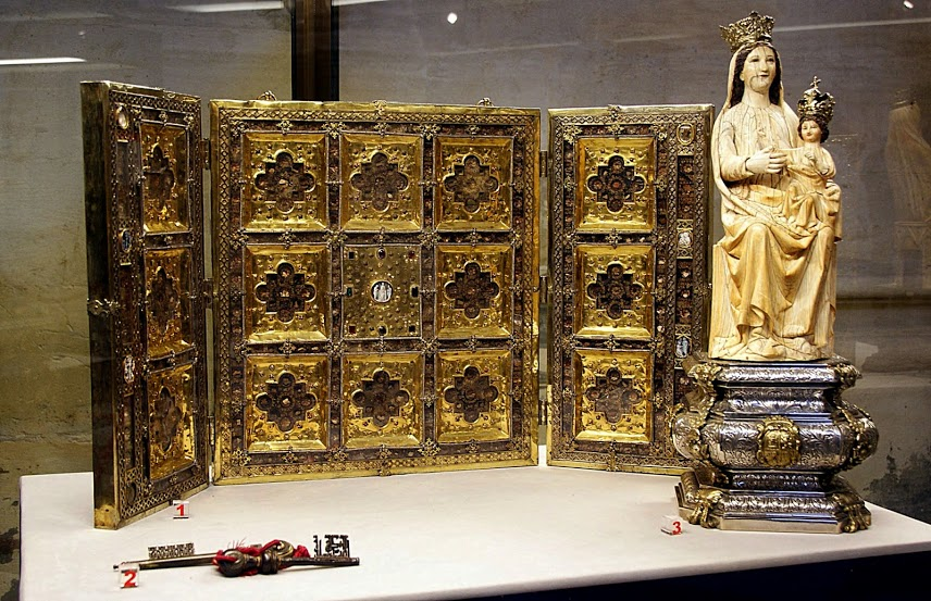 El tríptico-relicario conocido como las Tablas alfonsíes fue donado a la catedral de Sevilla por Alfonso X el Sabio, junto a las llaves de la ciudad de Sevilla entregadas a Fernando III el Santo en 1248.